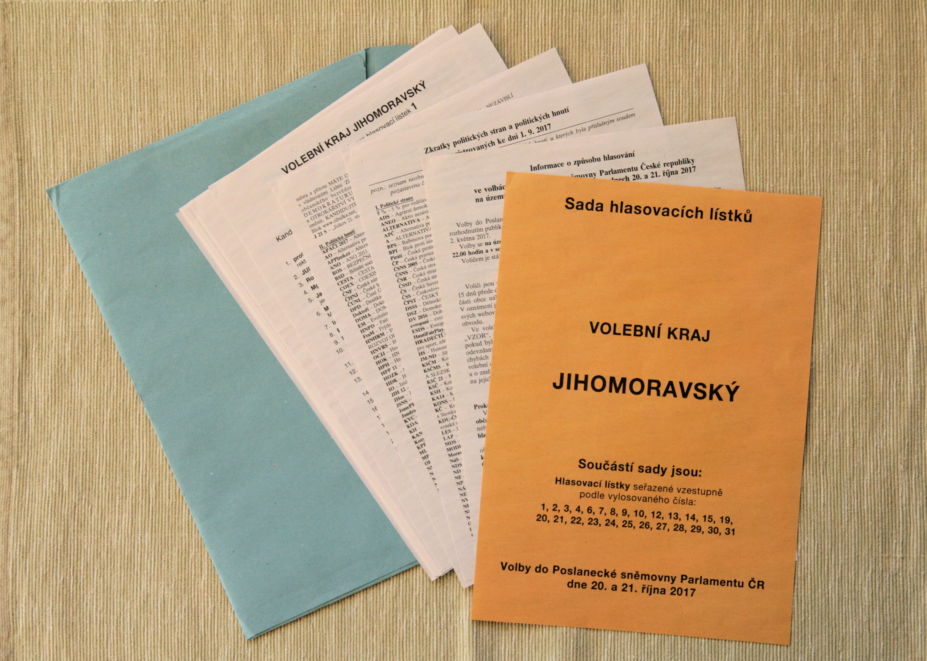 Obálka se sadou hlasovacích lístků pro volby do Poslanecké sněmovny Parlamentu ČR 20.-21. října 2017, určená pro hlasování v Jihomoravském kraji. Úvodní listy.